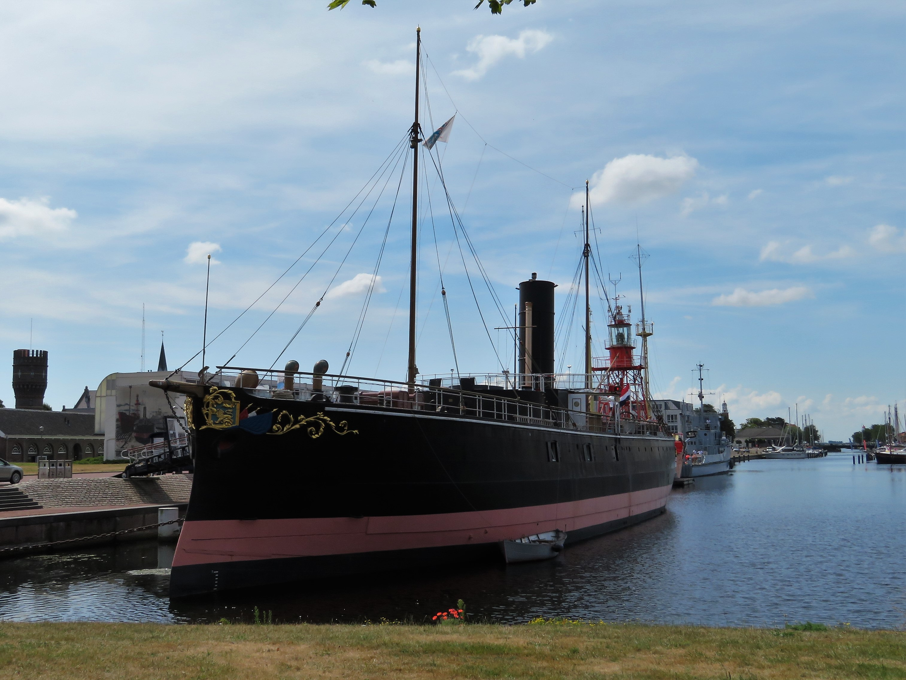 Zr.Ms. Buffel (1868) aan de Koningskade in Hellevoetsluis in het Maritiem Kwartier